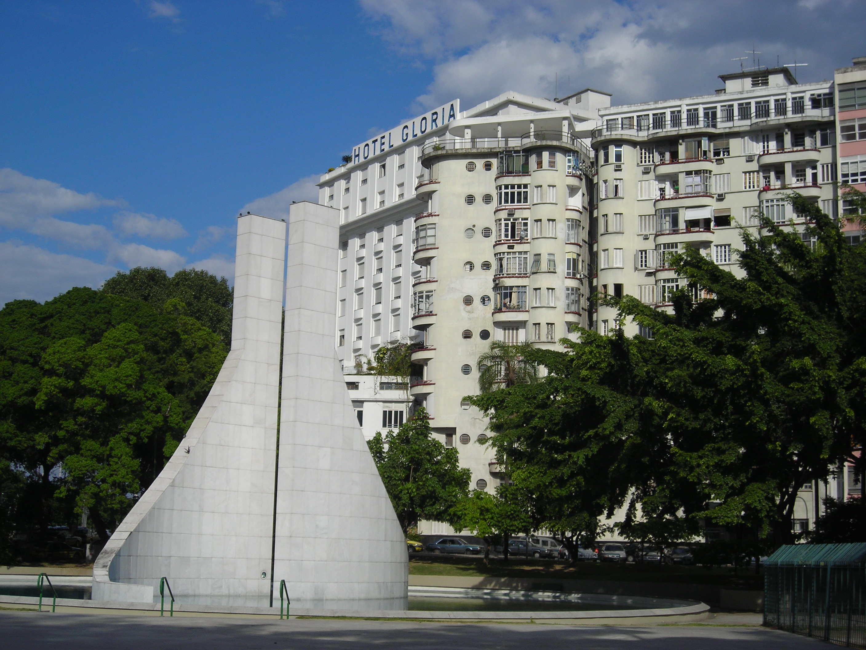 Hotel Gloria Rio de Janeiro